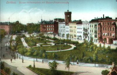 Der Kaiser-Wilhelm-Platz (jetzt Brandenburger Platz) in Cottbus auf einer alten Postkarte.